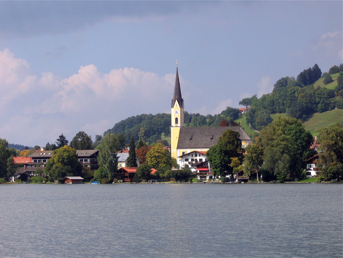 Ortszentrum Schliersee von Süden, Kirche St. Sixtus